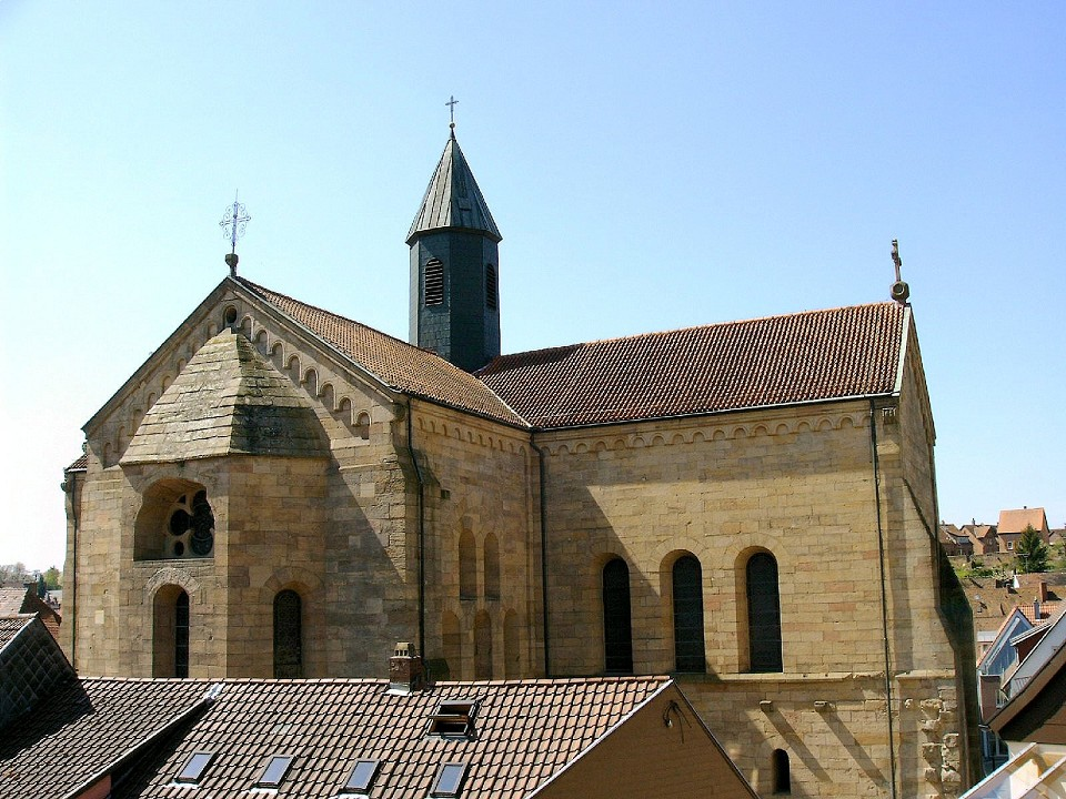 Abteikirche Otterberg